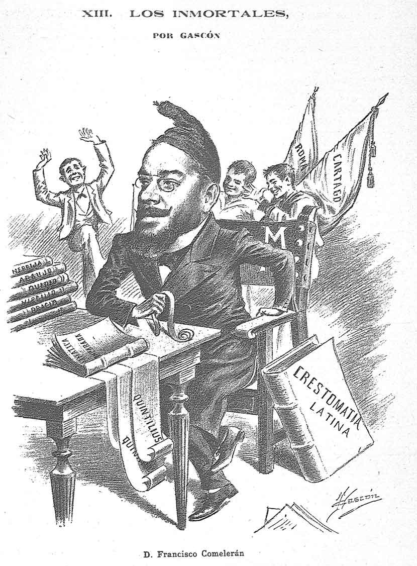 XIII Los Inmortales. Francisco Comelerán, de Gascón.